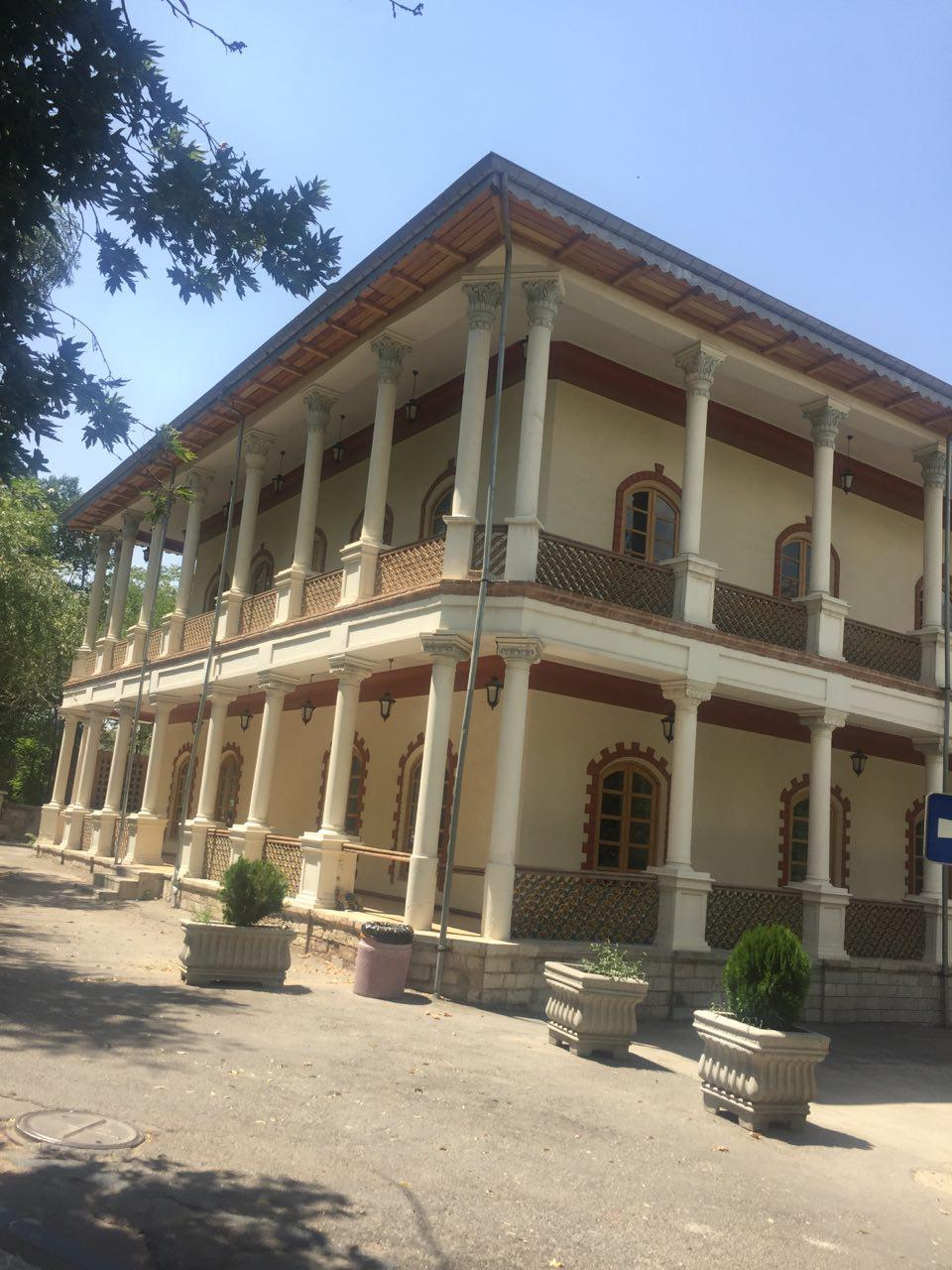 عمارت قصر یاقوت سرخه حصار